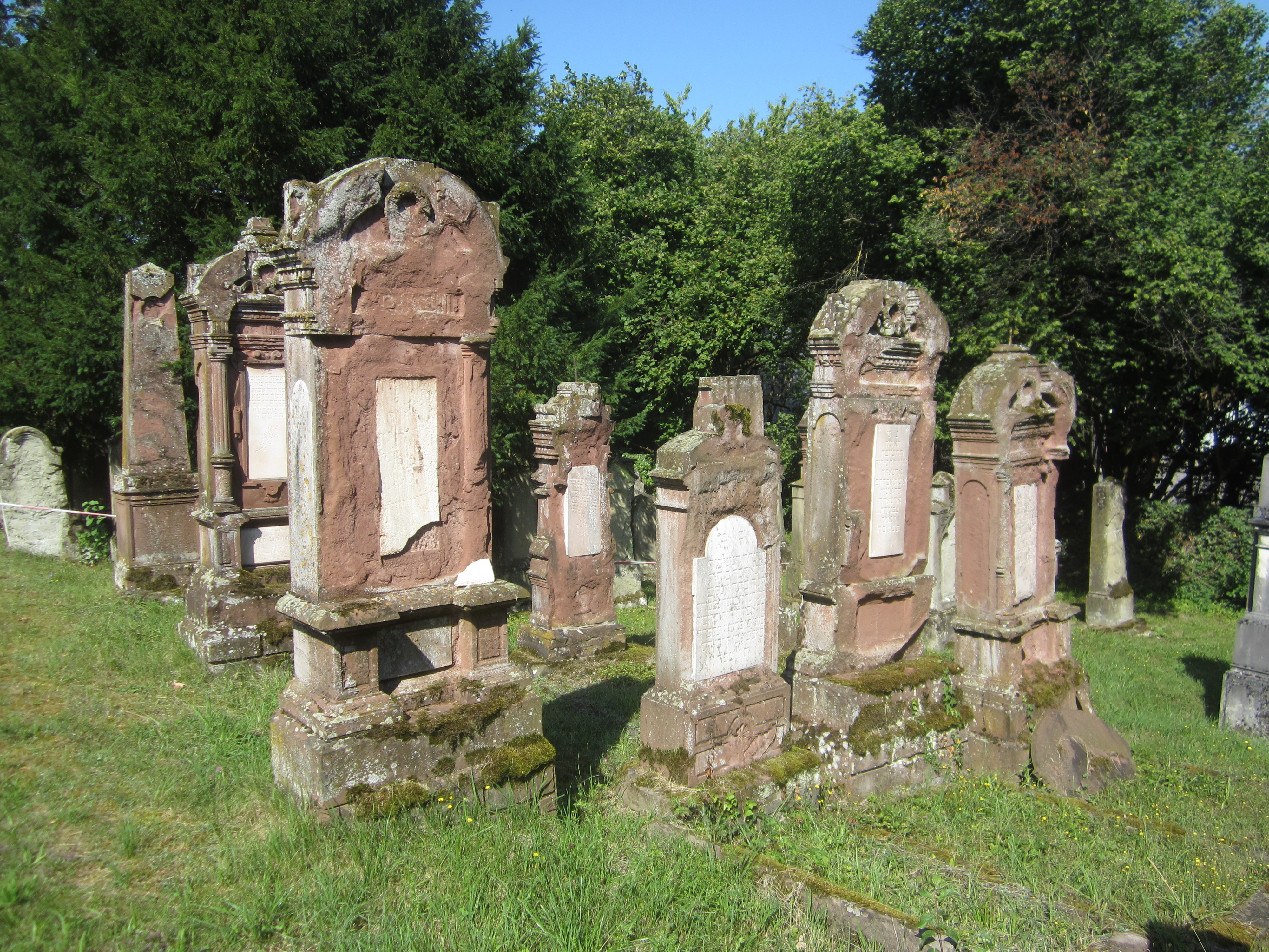 Jüdischer Friedhof Jebenhausen, neuer Teil, mittlerer Bereich